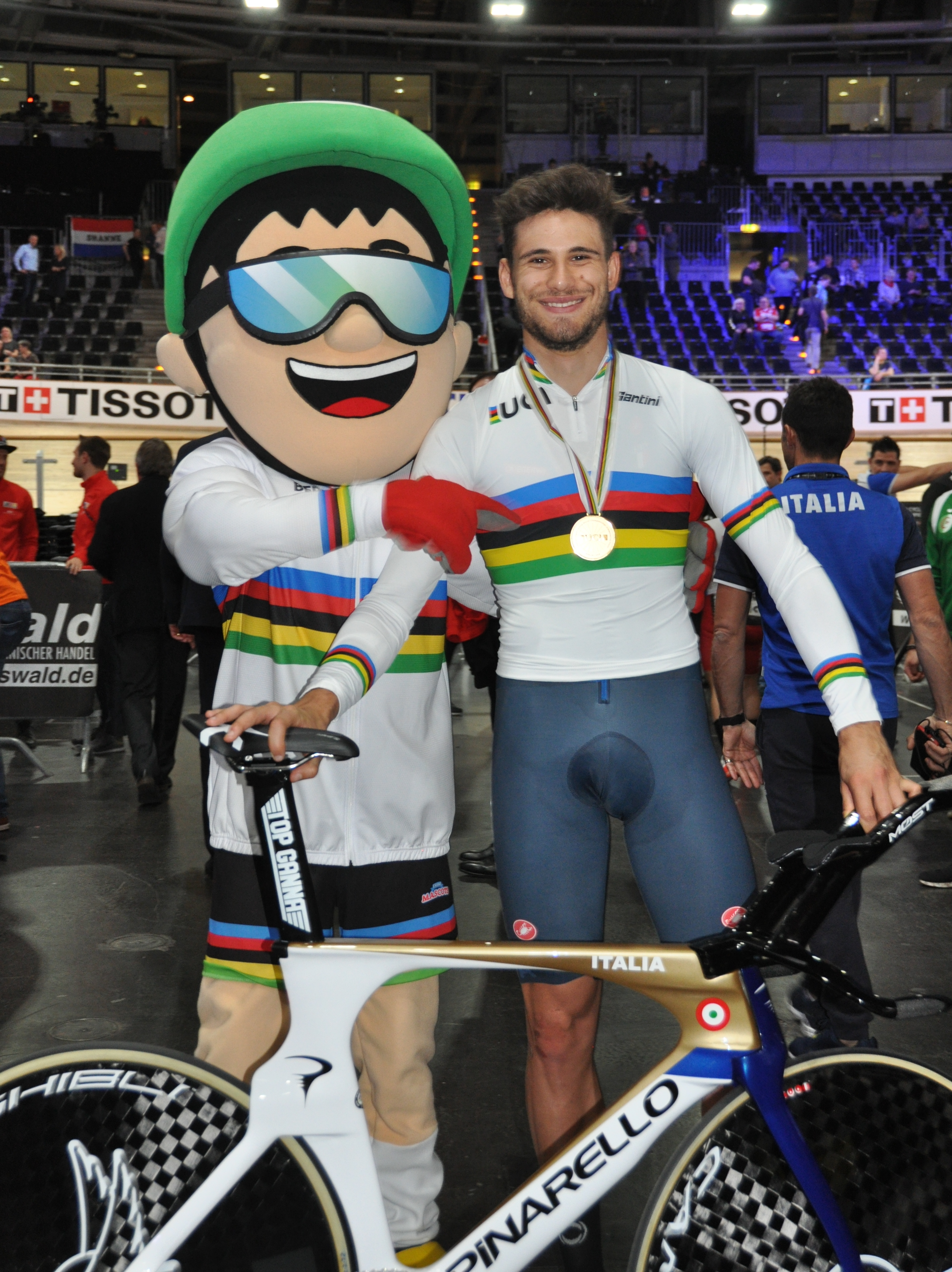 Filippo Ganna, Weltmeister in der Einerverfolgung mit Maskottchen Tracky